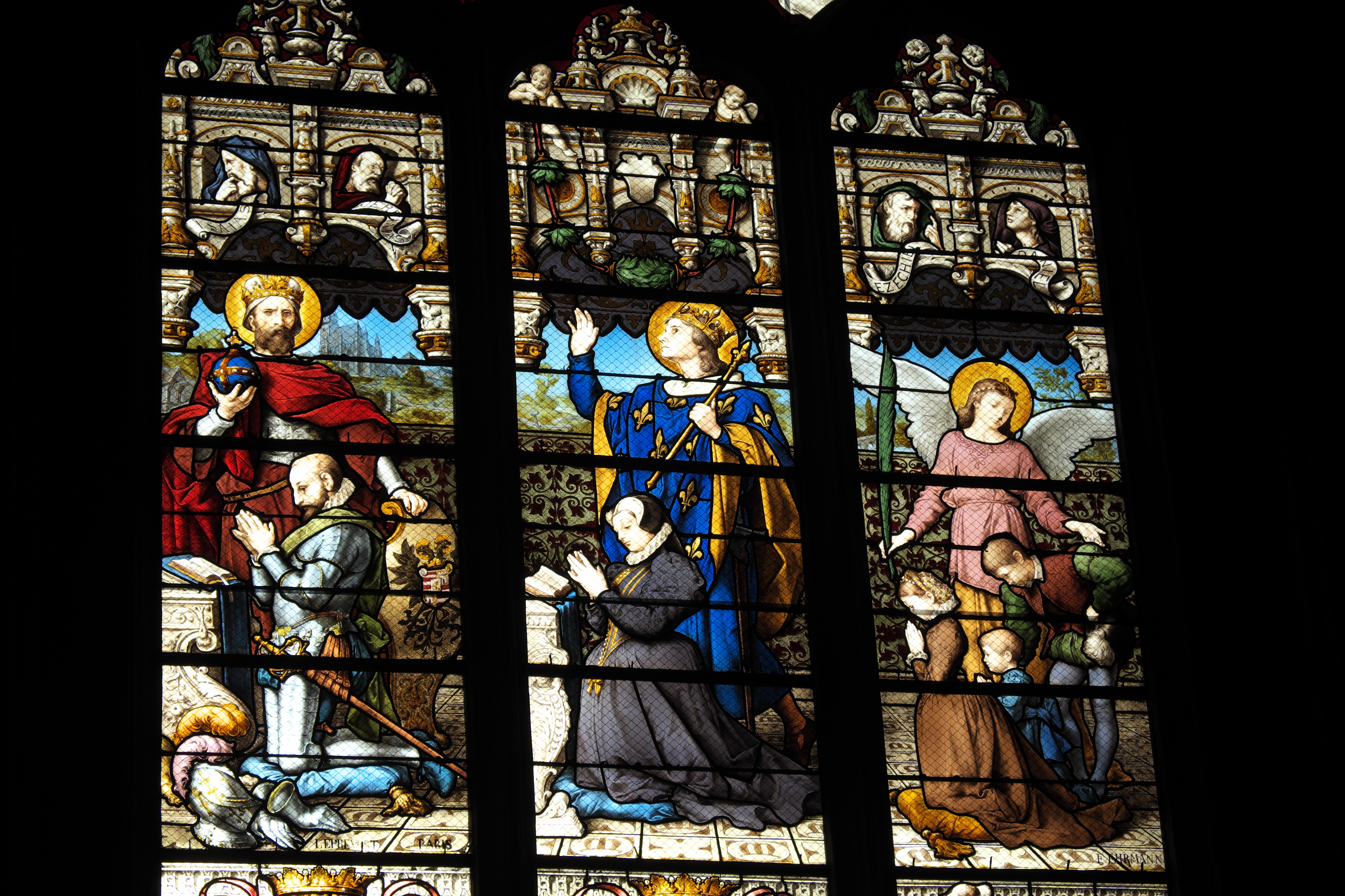 Katholische Pfarrkirche Saint-Martin (Collégiale Saint-Martin) in Montmorency, Bleiglasfenster aus dem 19. Jahrhundert mit Signatur LEPREVOST PARIS und F. EHRMANN; Darstellung: Henri de Montmorency mit Kaiser Heinrich II., seine zweite Frau Louise de Budos (1575–1598) mit Ludwig dem Heiligen und drei Kinder, im Maßwerk: Gnadenstuhl; Karton: Charles Leprévost, Ausführung: François Emile Ehrmann (siehe: Dominique Foussard, Charles Huet, Mathieu Lours: Églises du Val-d'Oise. Pays de France, Vallée de Montmorency. Société d'Histoire et d'Archéologie de Gonesse et du Pays de France, 2. Auflage, Gonesse 2011, ISBN 9782953155426), Ausschnitt